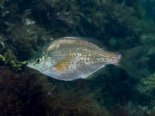 マタナゴ Ditrema temminckii